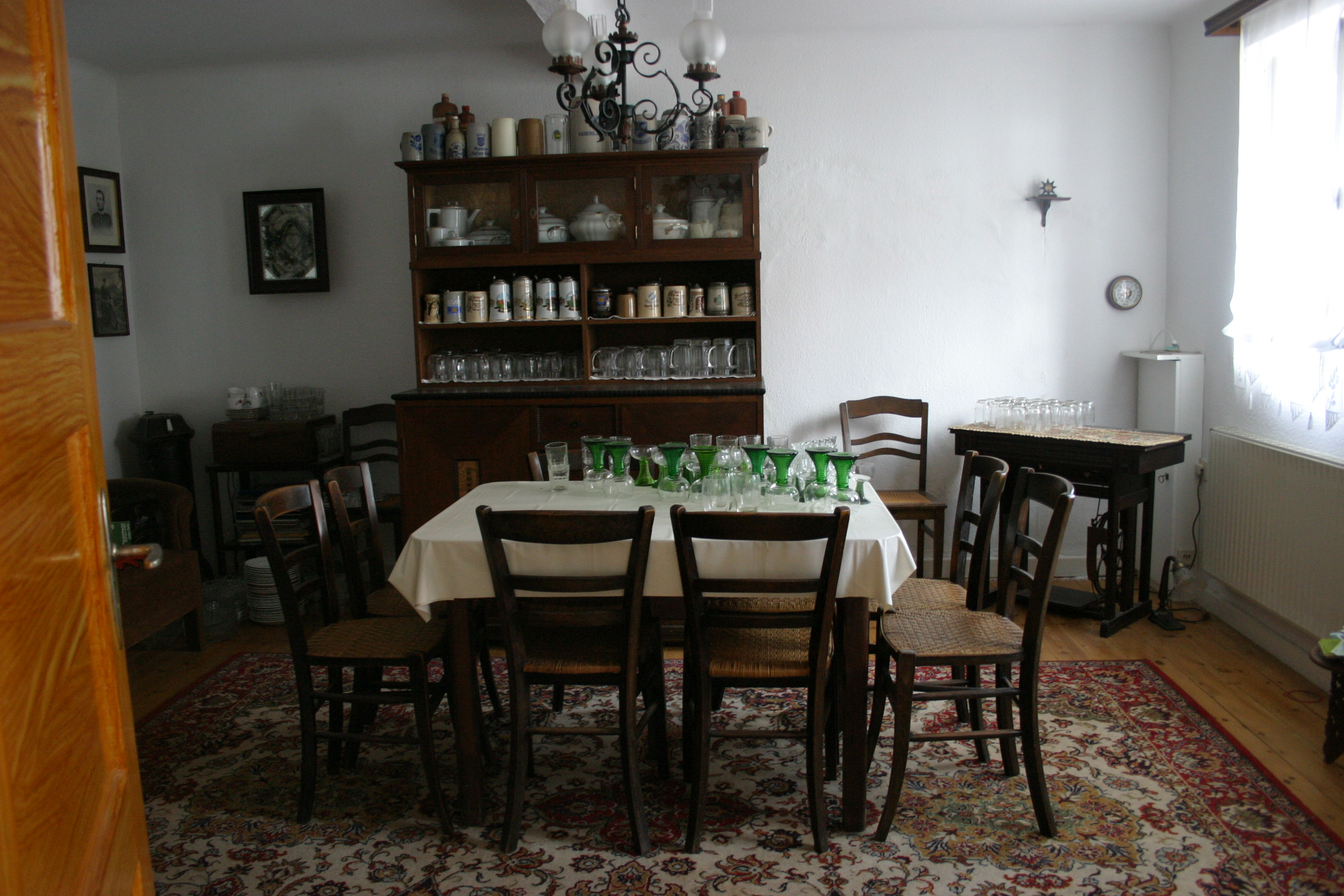 Ehemalige Gaststätte Rauhe Hand in Queidersbach.